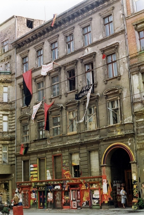 Ost-Berlin, Besetzte Häuser, Kastanienallee, Haus mit Rat-Pub im Keller, das Foto habe ich im Juni 1990 gemacht